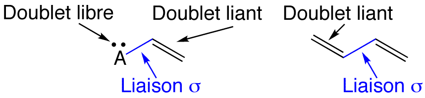 Image montrant les doublets électroniques libres ou liants en chimie